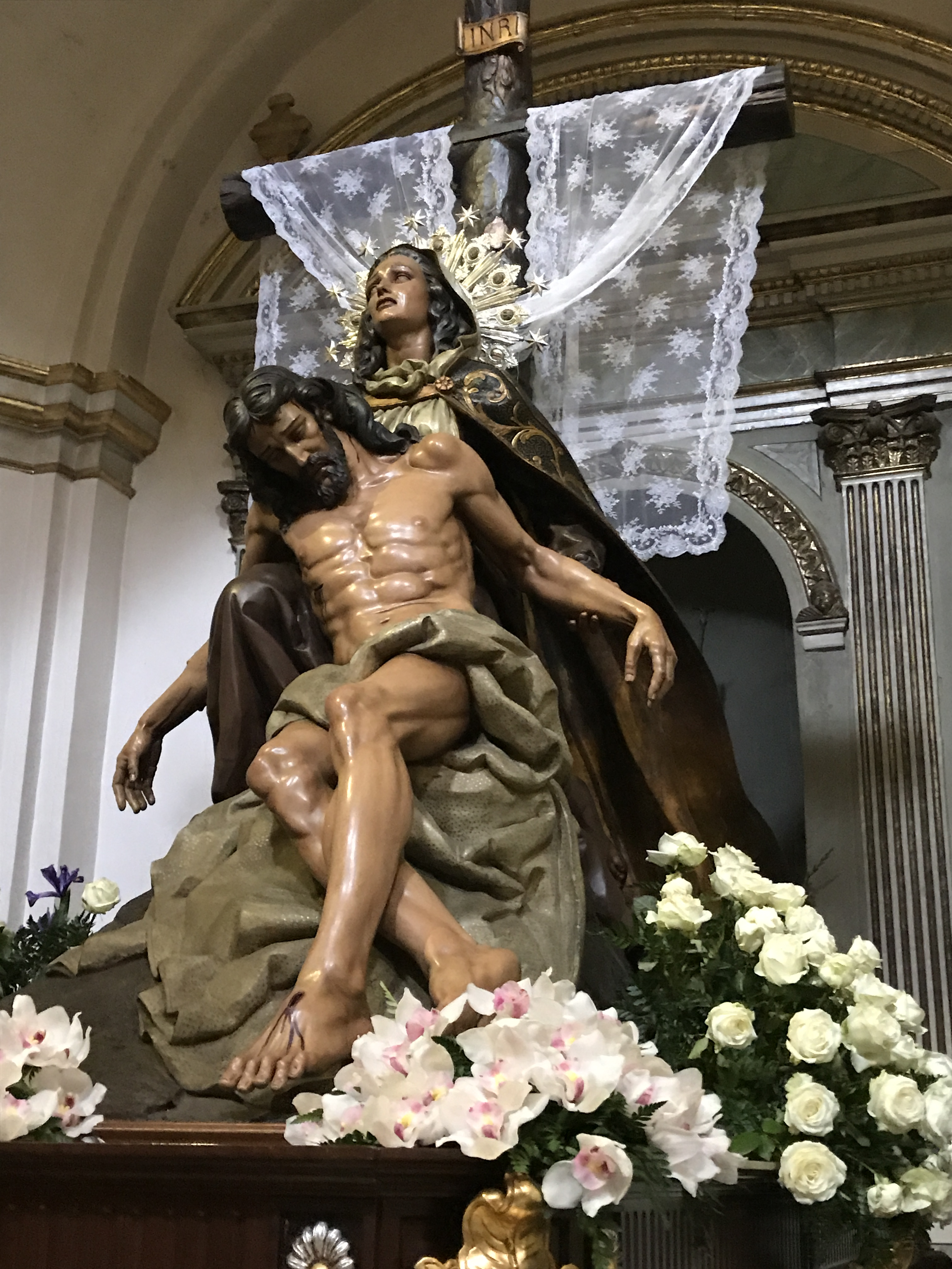 Federico Coullat-Valera